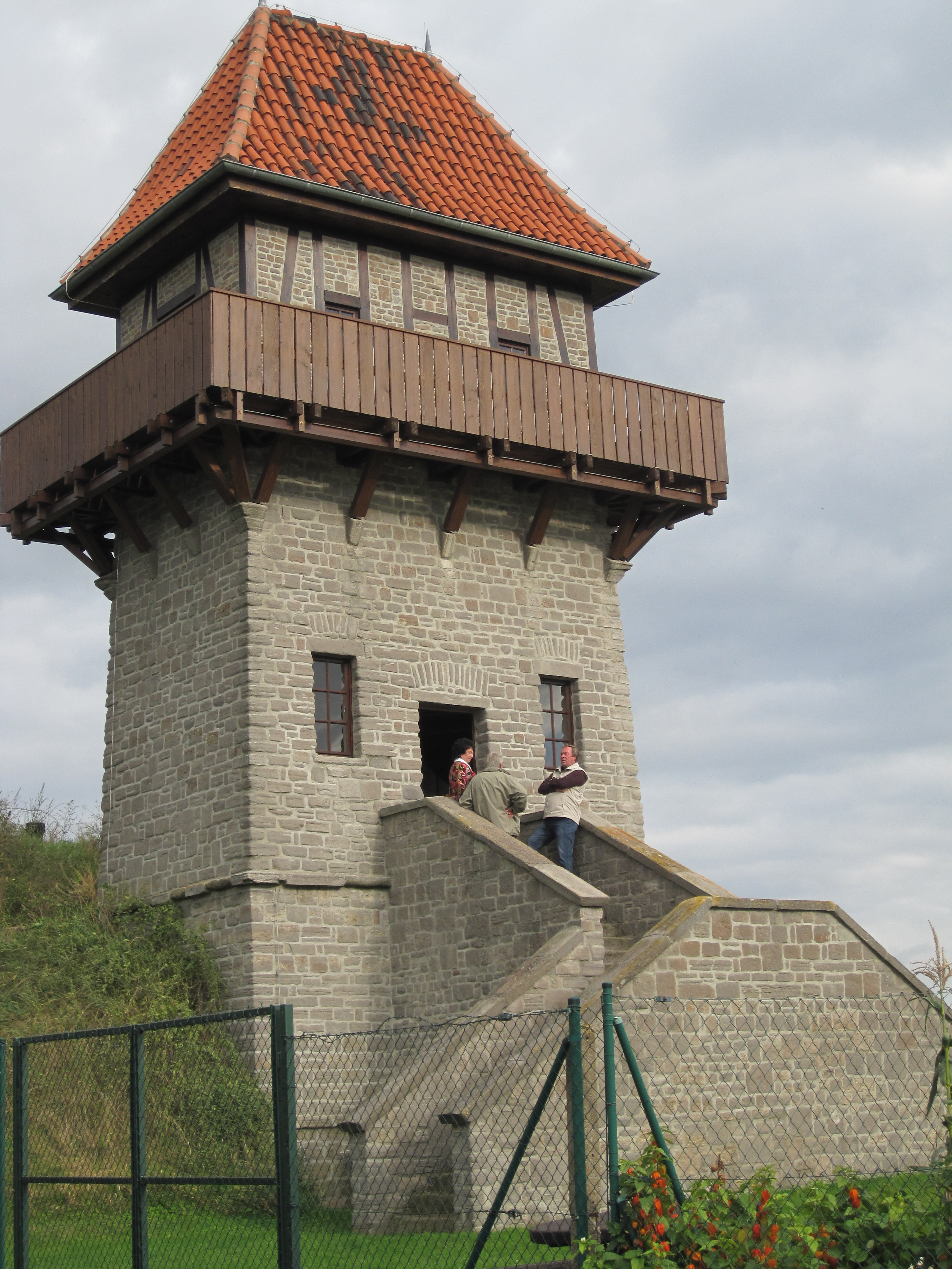 Aussichtsturm auf dem „Kringel“ zu Alsleben (Saale)